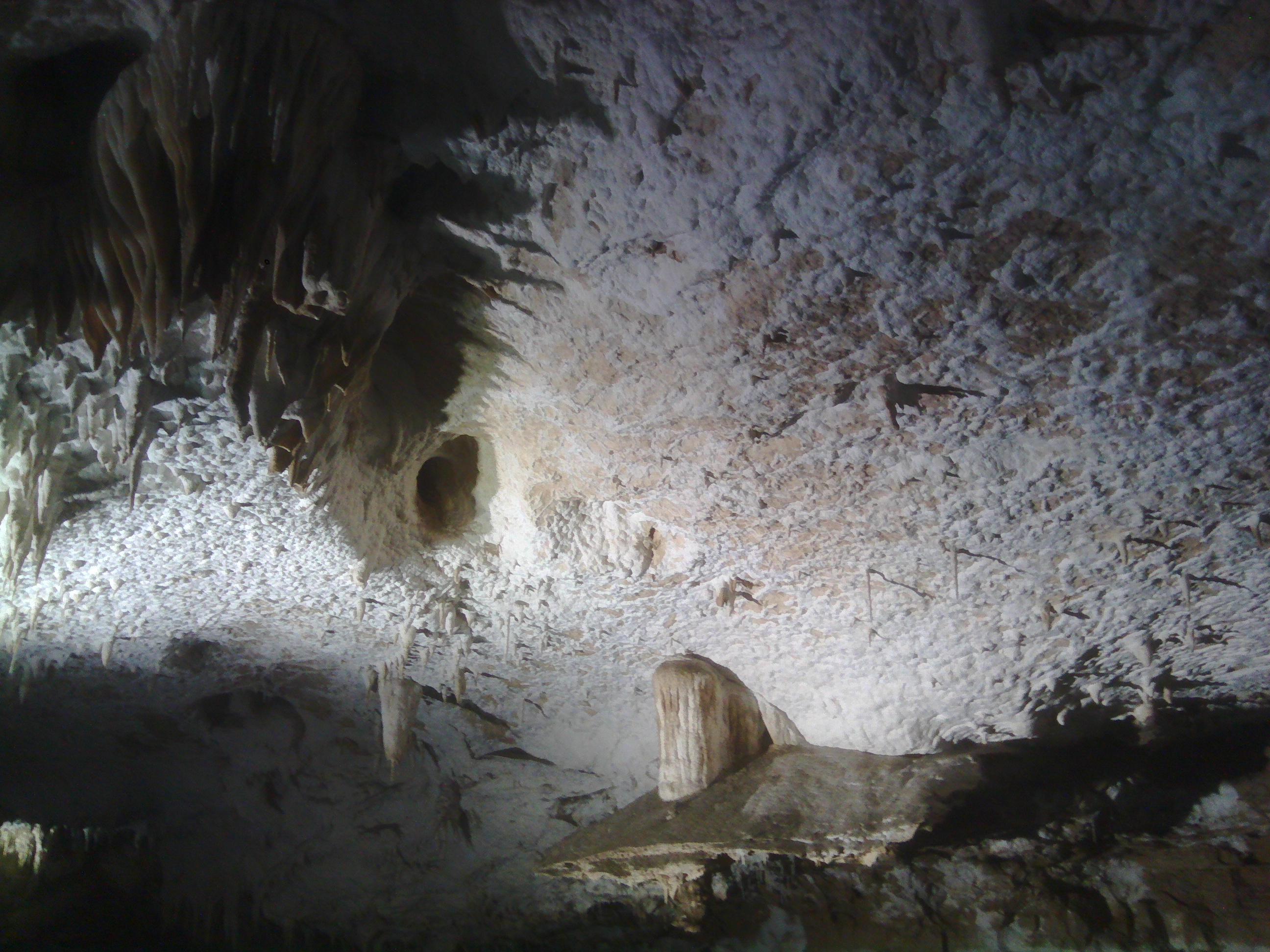 Сталактити у Рајковој пећини